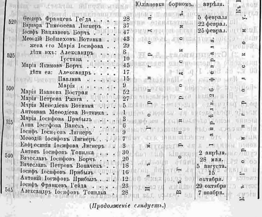 Волинські чехи, перепис 1888